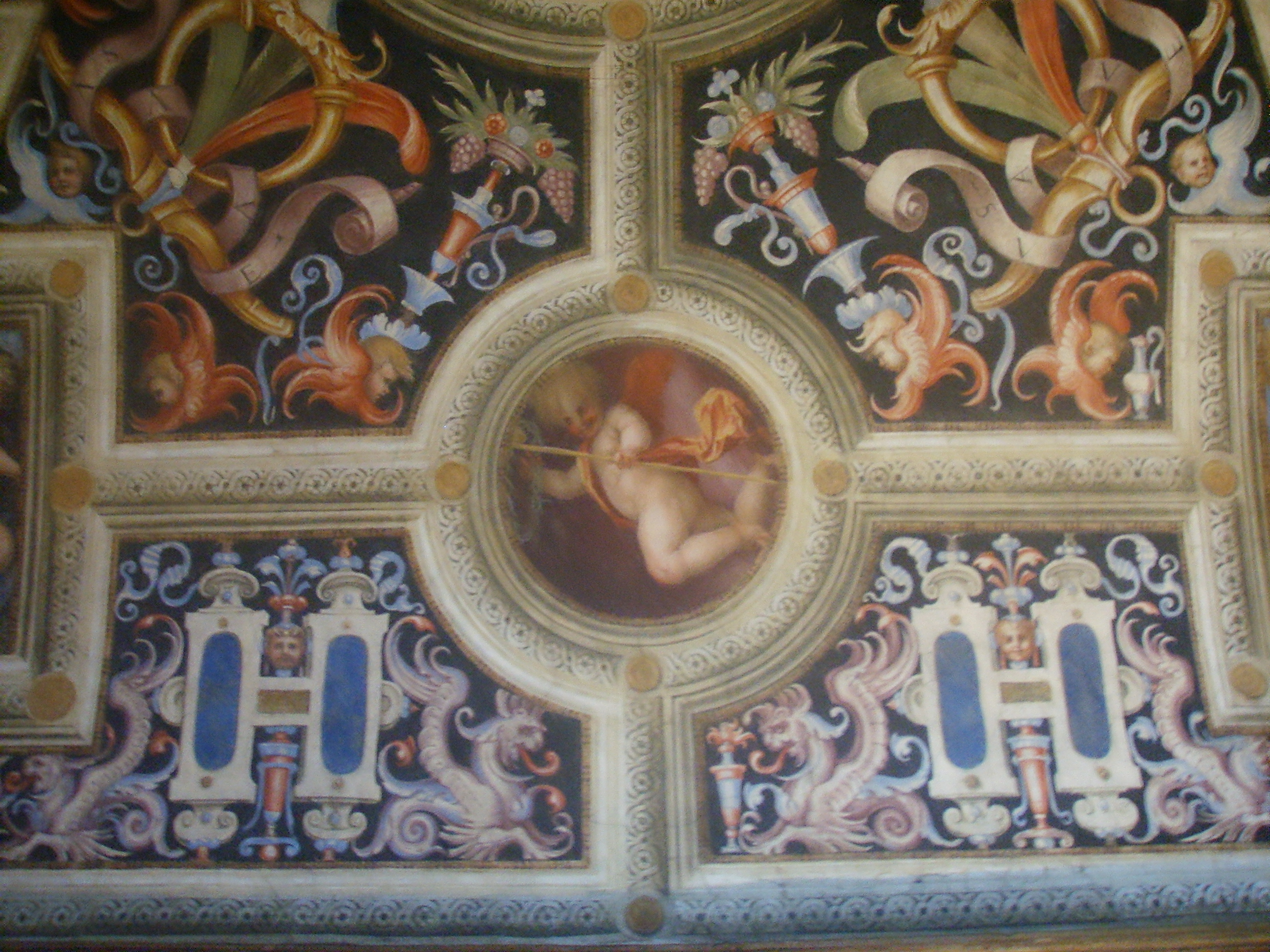 Cappella dei papi in santa Maria Novella church fresco celiling decoration in Florence, Italy